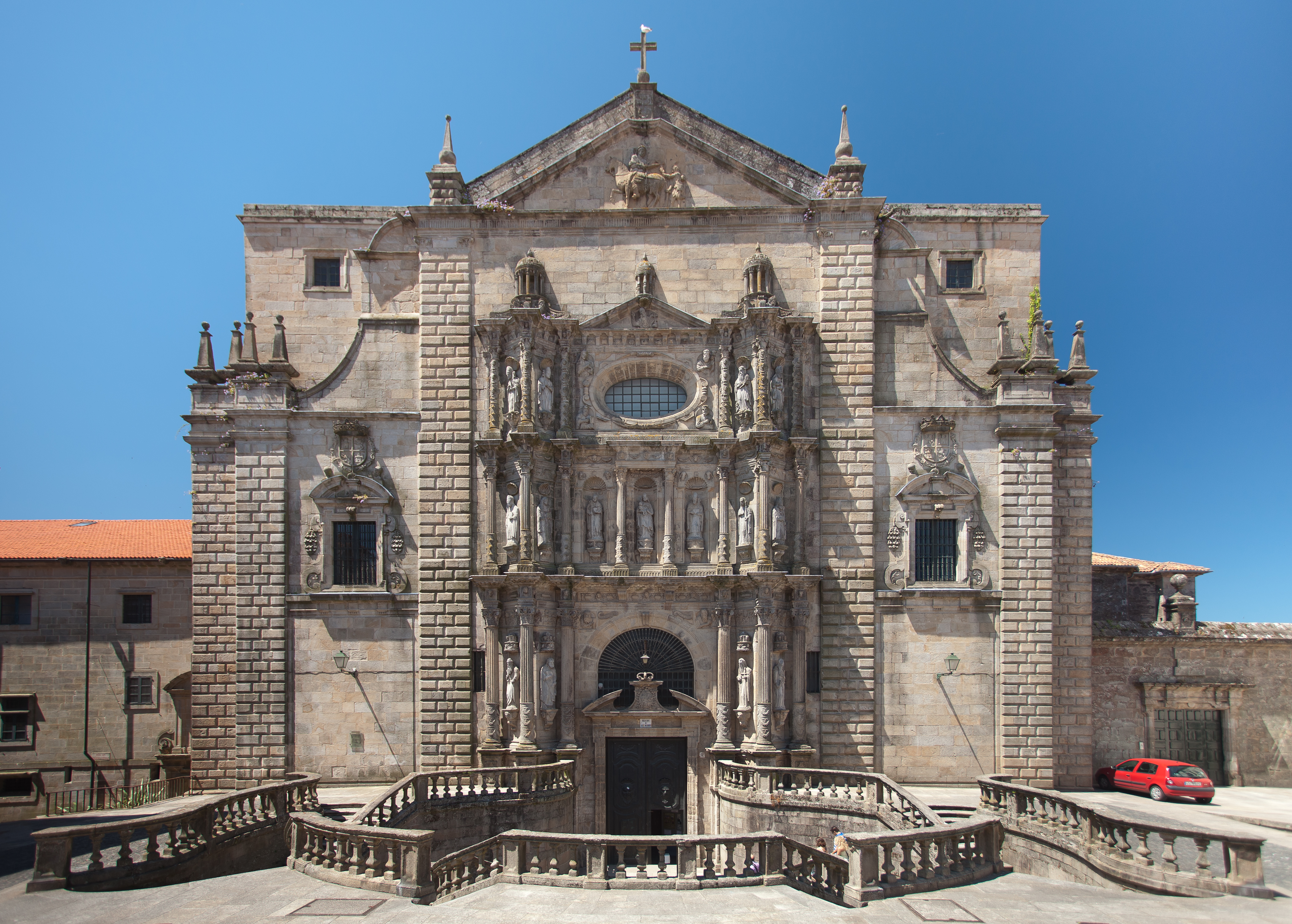 Mosteiro de San Martiño Pinario. Santiago de Compostela, Galicia (Spain)